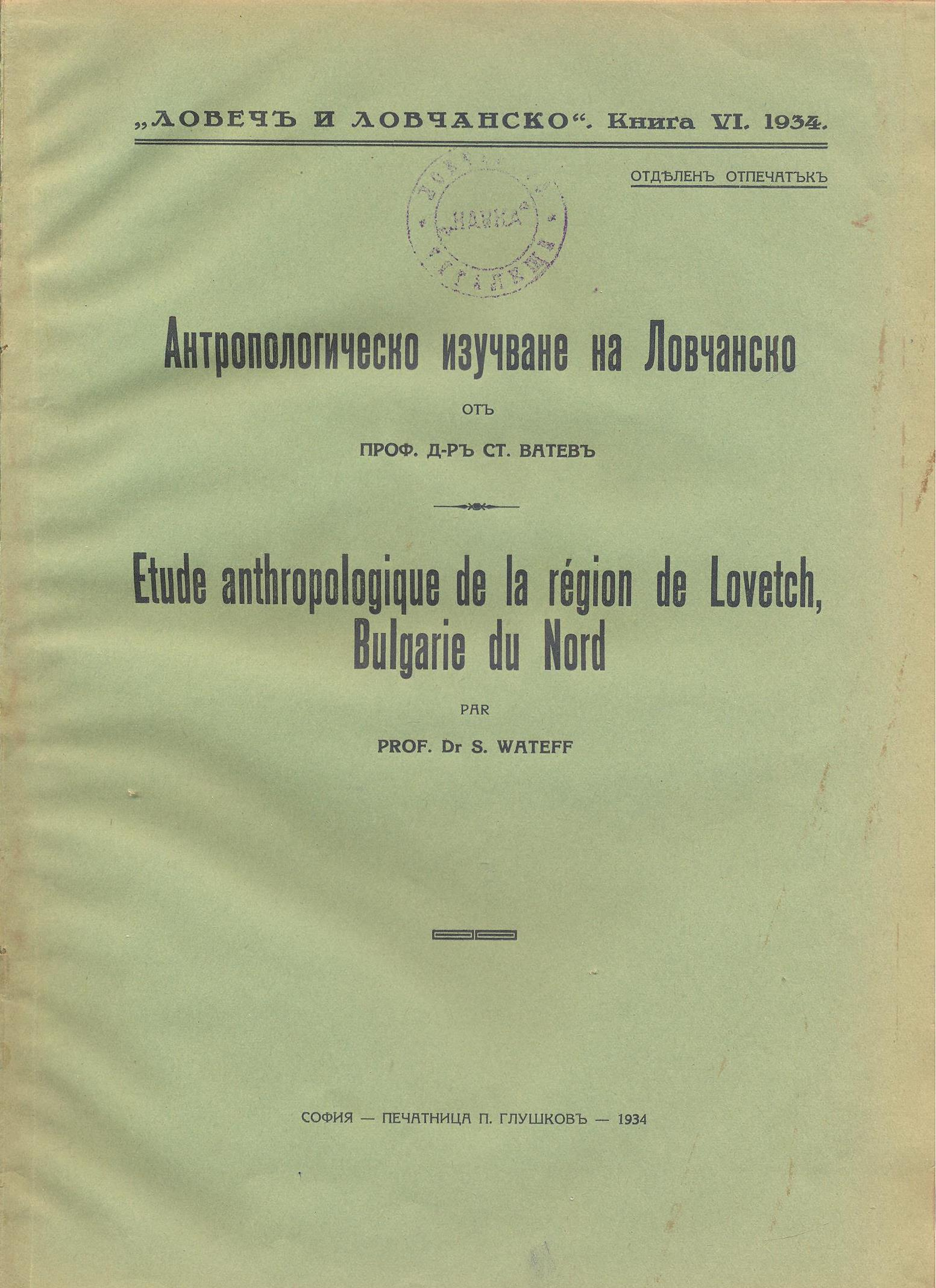 Корицата на книгата „Etude anthropologique de la r'egion de Lovetch, Bulgarie du Nord“ от Стефан Ватев, 1934